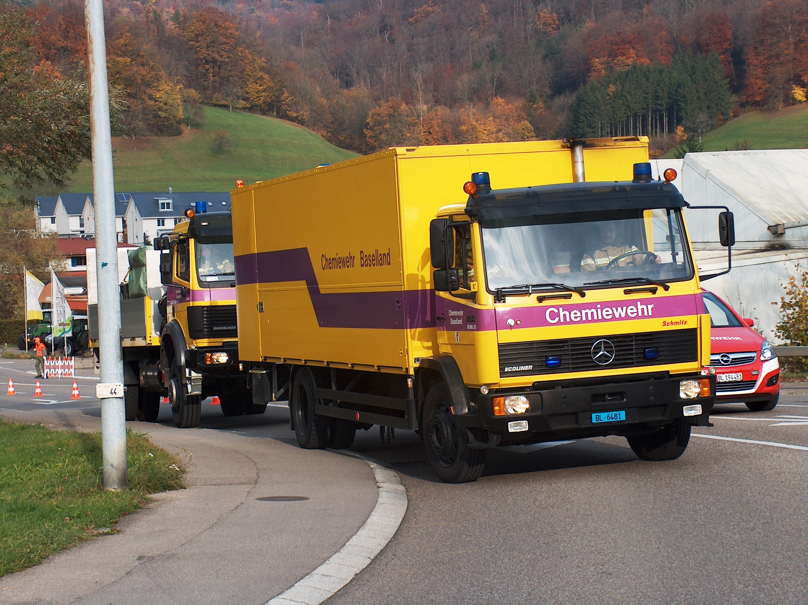 Einsatzzug der Chemiewehr Basel-Landschaft an der Hauptübung "Senza Limiti" der Stützpunktfeuerwehren Liestal und Sissach, der Feuerwehr Lausen, der Betriebswehr der SBB, der Chemiewehr und des Katastrophenschutzes, in Lausen, Höhe alter Bahnhof/Güterterminal. Im Vordergrund Rüstwagen, im Hintergrund Grossgerätefahrzeug.